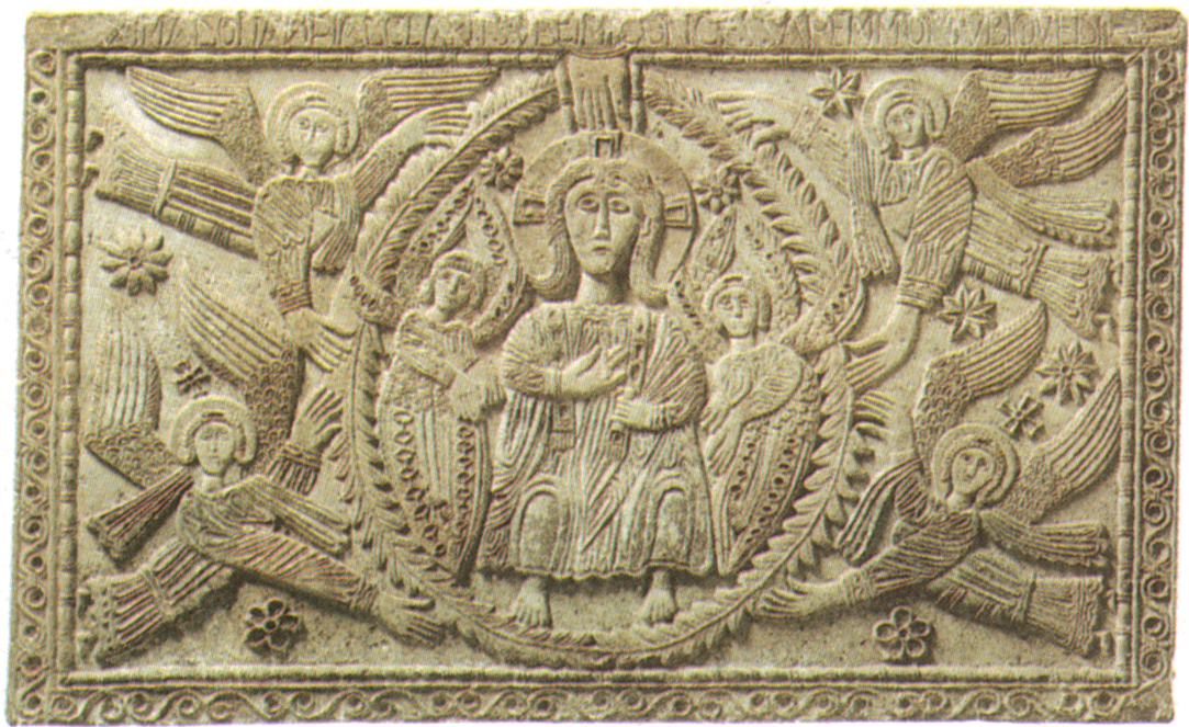 Mi sembra che la foto abbia carattere artistico.. --Jaqen «il guardiano» 13:26, 16 lug 2007 (CEST) A me non sembra. la foto non è stata scattata con particolari giochi di luci ed ombre né è stata presa su un set fotografico. è solo ritagliata, quindi non vedo il carattere artistico, ce ne sono altre centinaia come questa. I rilievi sono stati fotografati oggettivamente, non "soggettivamente", questo è il confine tra artistico e non, imho. --SailKon le mani tra i capelli. 13:43, 16 lug 2007 (CEST) Contents 1 Summary 2 Licensing 3 Licensing 4 Original upload log Summary illustrazione in pd-italia da: aa.vv. magistra barbaritas, i barbari in italia, milano, libri scheiwiller 1984 Licensing Categoria:Immagini d'arte longobarda